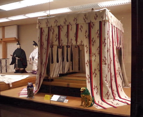 帳（国立歴史民俗博物館）